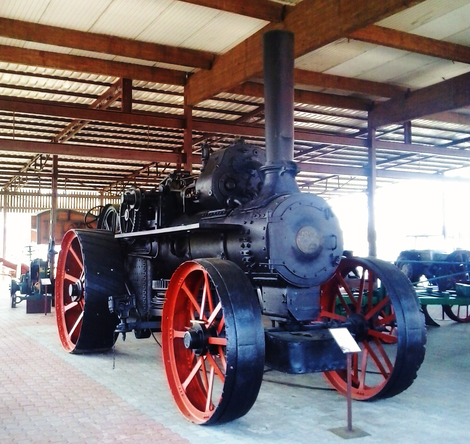 Lokomobila samobieżna Heuke Dampfpflug Lokomotiv-Fabrik, Gatersleben z 1913r. MNR Szreniawa.